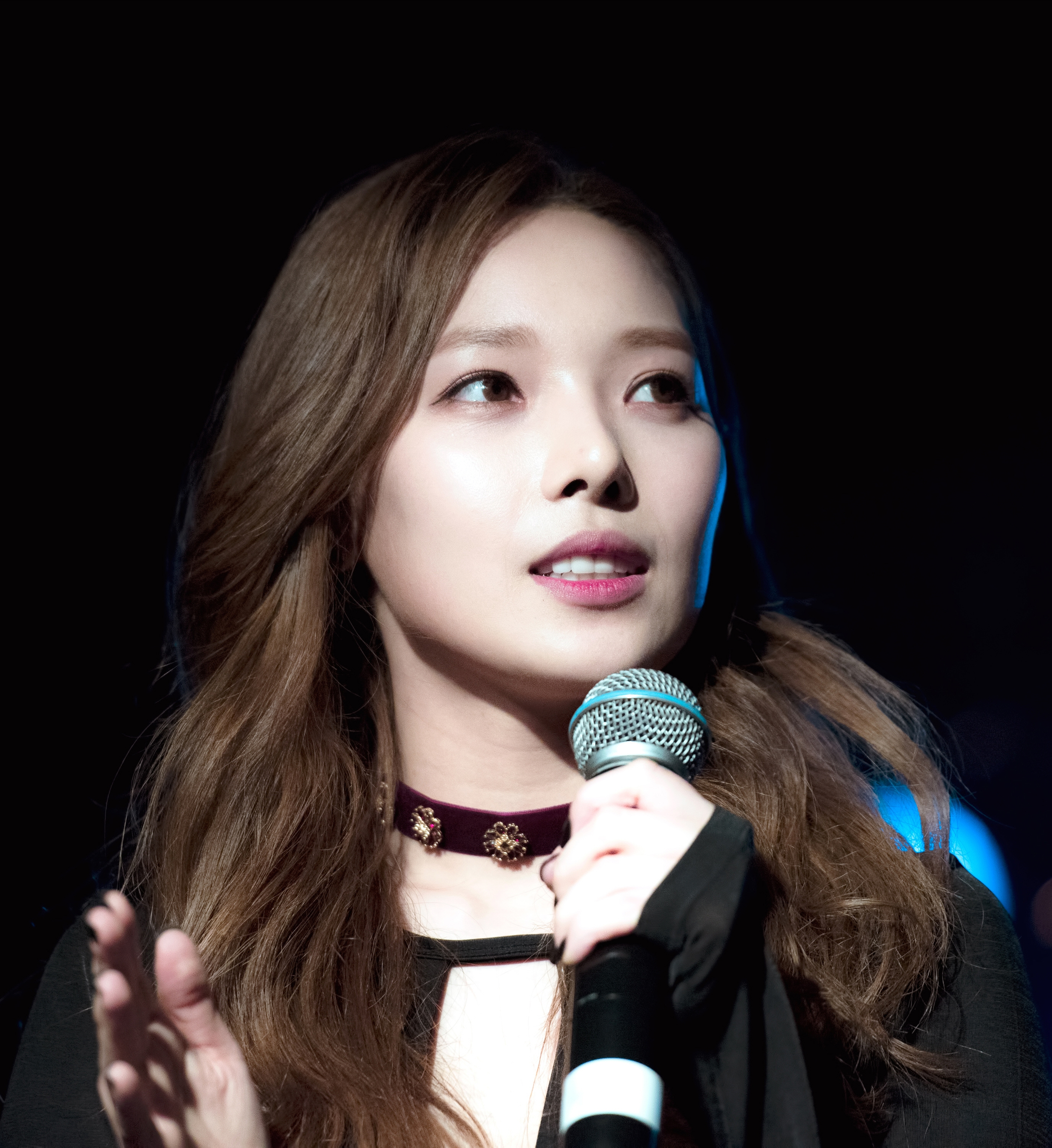 161212 신촌 KARD 데뷔파티 전소민 4Pic